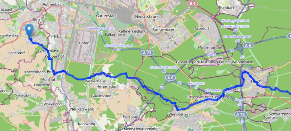 Jakobsweg von Feucht nach Nürnberg © OpenStreetMap contributors